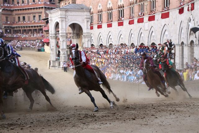 Momenti del Palio di Provenzano 2010 vinto dalla Selva con Silvano Mulas e Fedora Saura